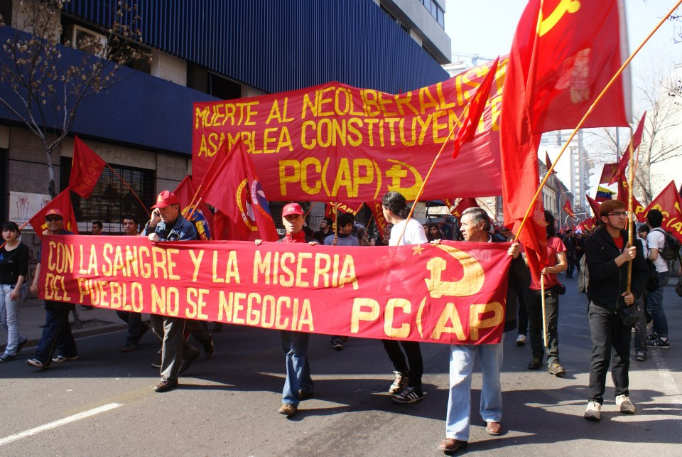 Bloque del Partido Comunista Chileno (Acción Proletaria) para la marcha en conmemoración por el 11 de septiembre realizada el 9/9/2012 en Santiago de Chile.